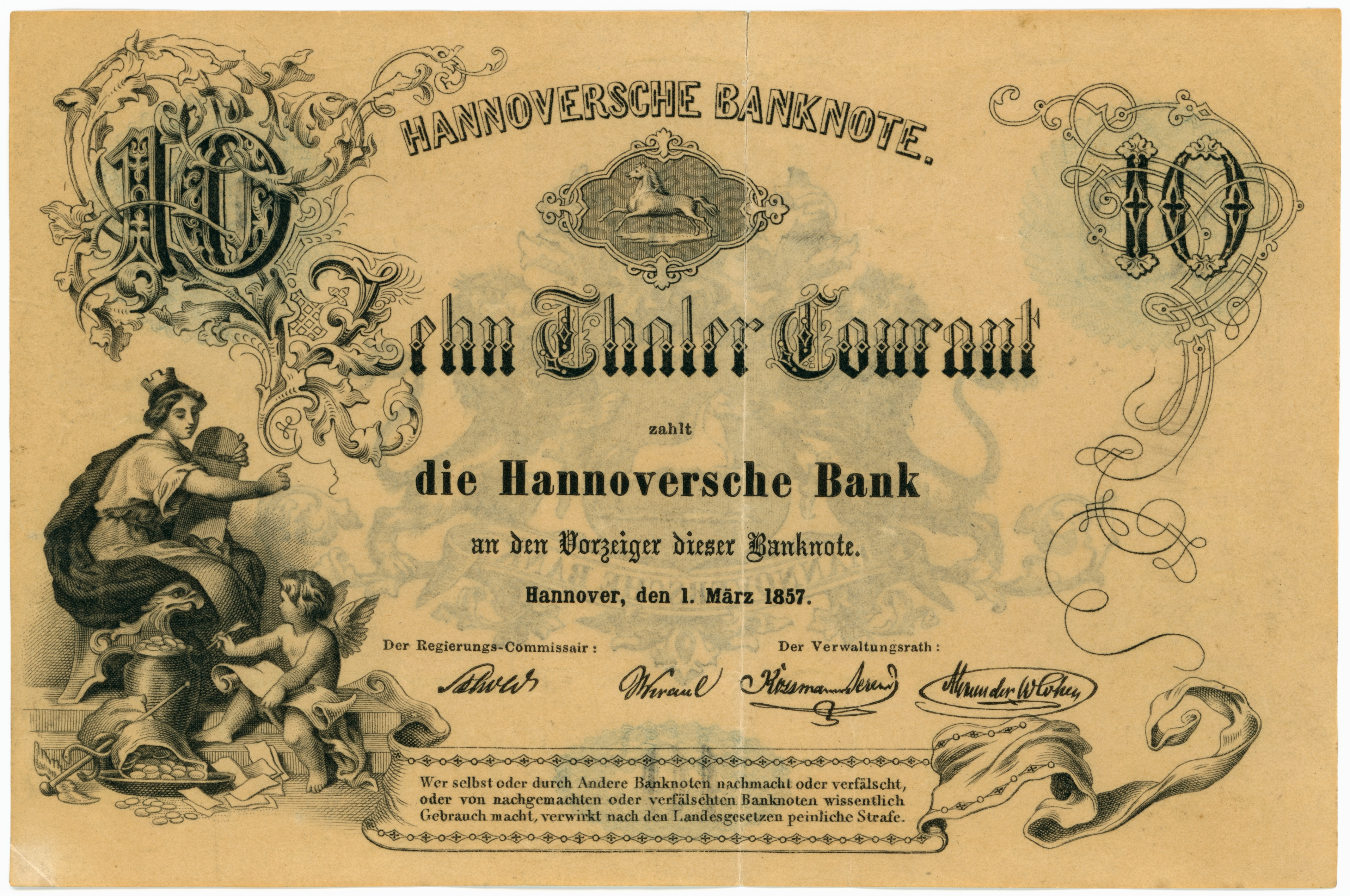 Geldschein mit folgendem Text auf der Vorderseite: „Hannoversche Banknote Zehn Thaler Courant zahlt die Hannoversche Bank an den Vorzeiger dieser Banknote. Hannover, den 1. März 1857 Der Regierungs-Commissair; Schow Der Verwaltungsrath: Kraul Kossmann Behrend Alexander Abraham Cohen ...“ ...